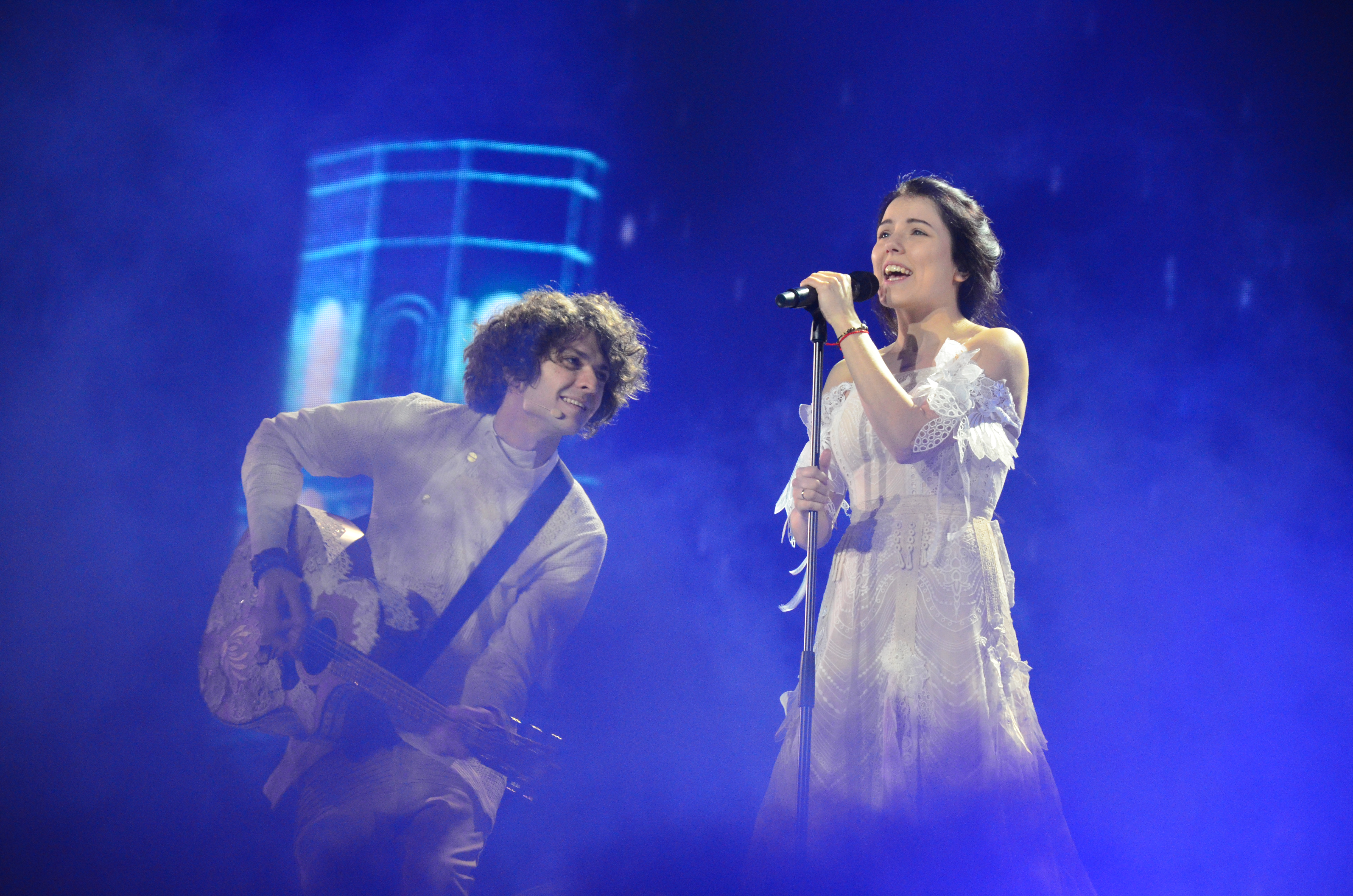 10 травня 2017 року у Києві відбулась генеральна репетиція 2 півфіналу "Євробачення".